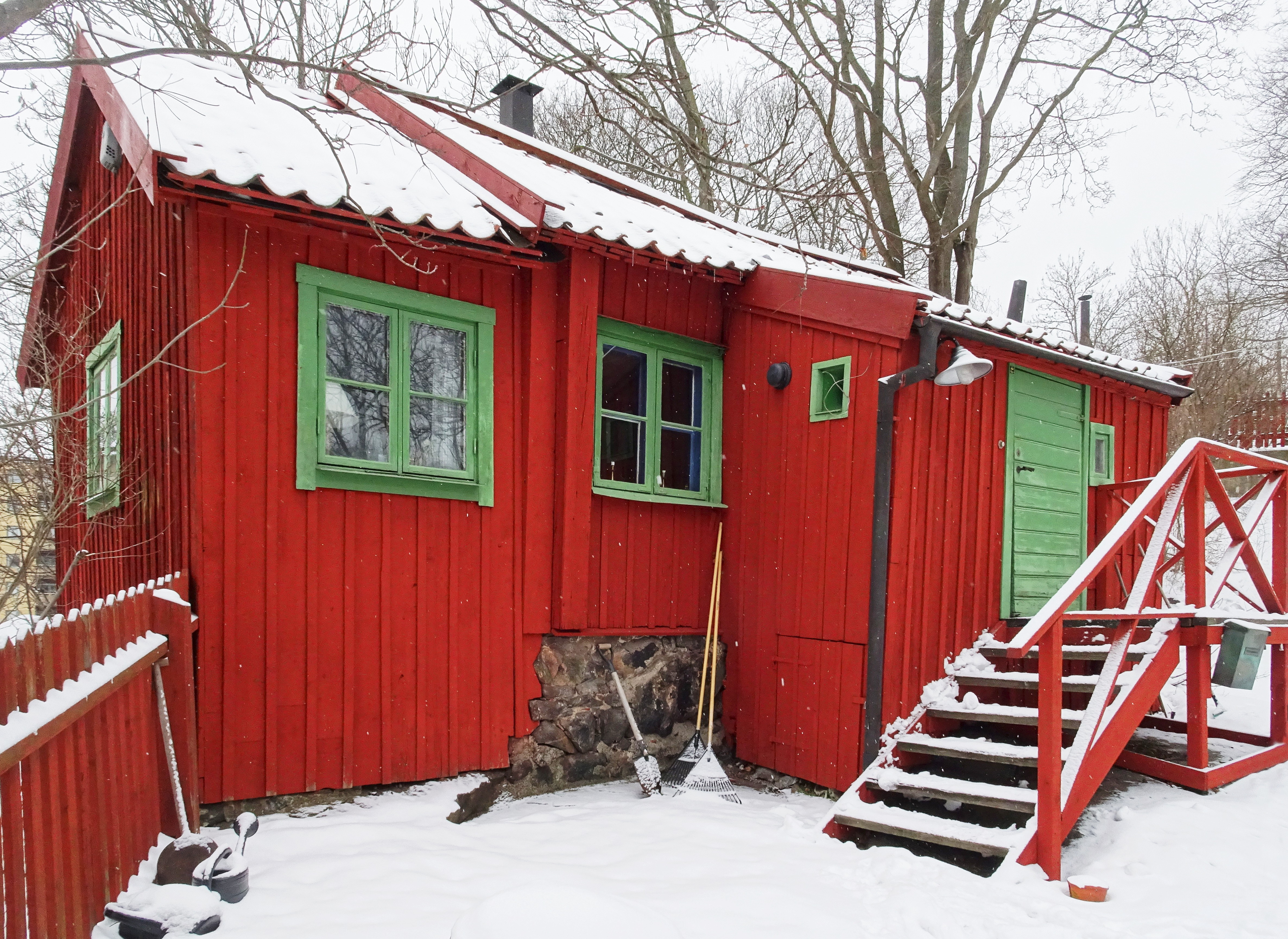 Svenska Ords skrivstuga i Vitabergsparken